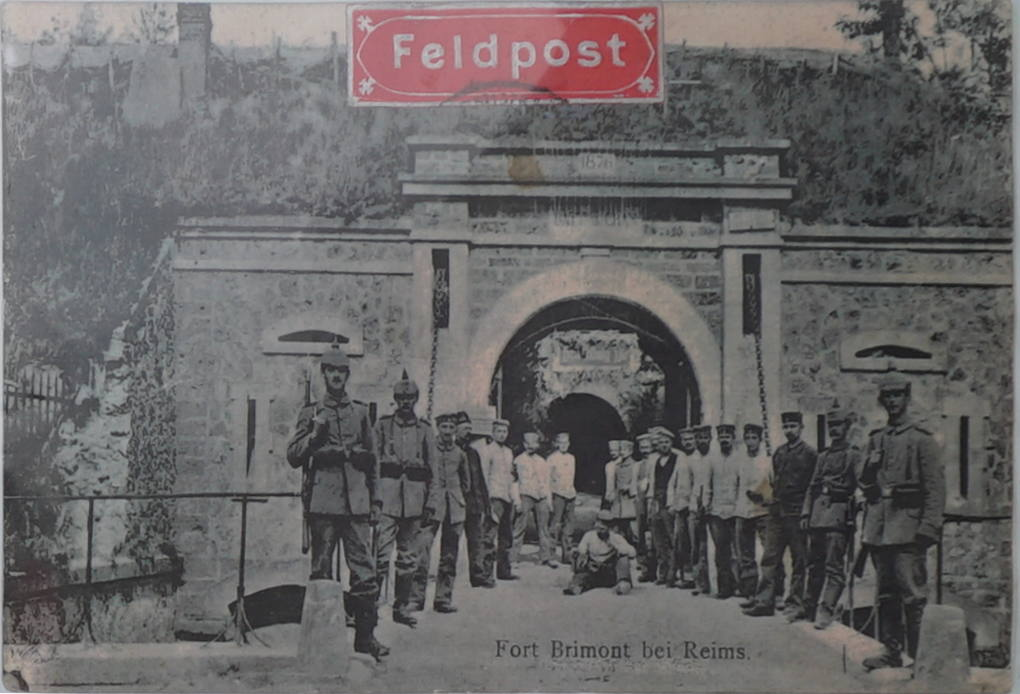 une vue de l'entrée de la batteir du Cran du fort de brimont.